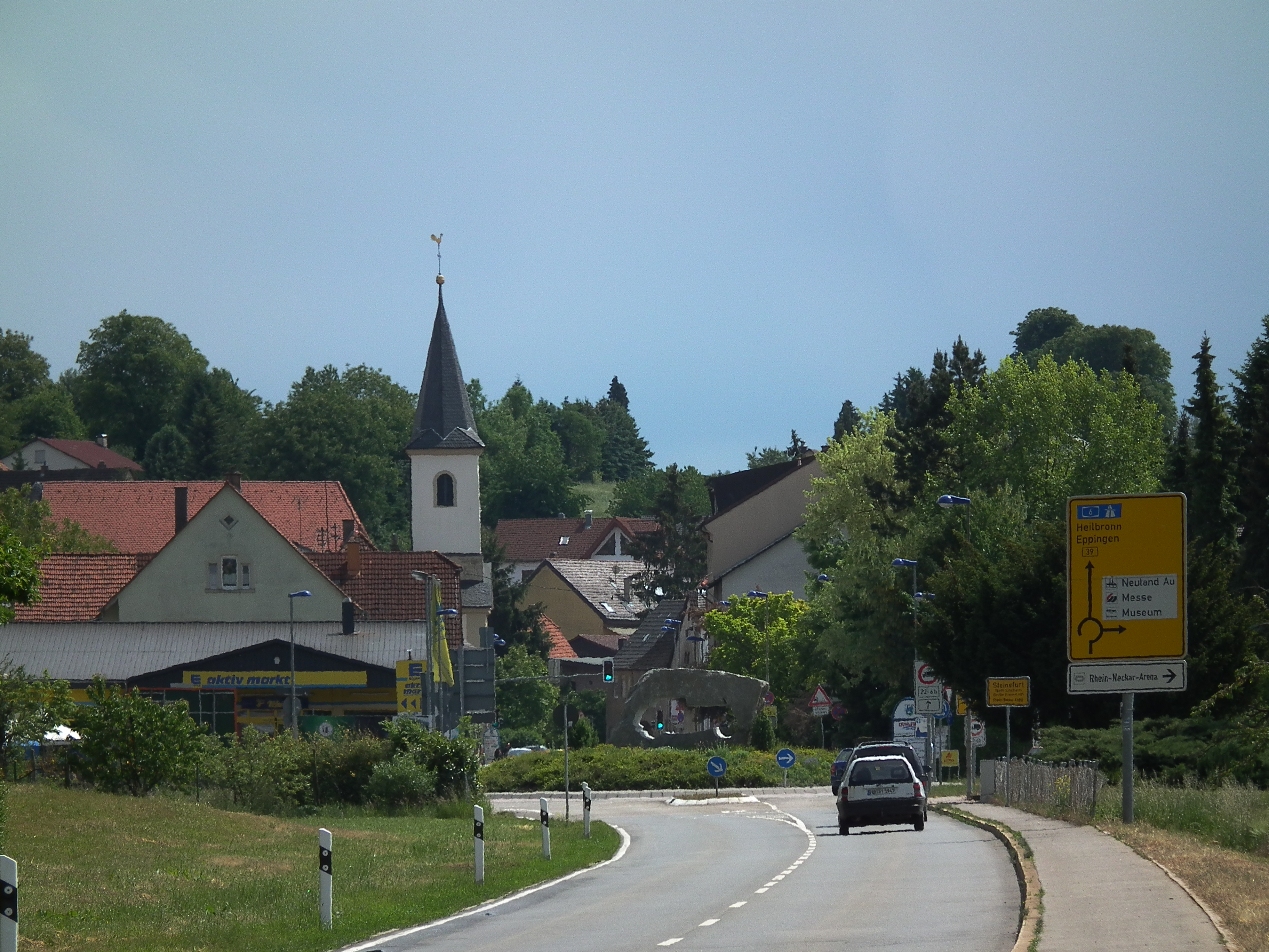 Ortseinfahrt von Steinsfurt, von Rohrbach kommend (Baden-Württemberg, Deutschland)